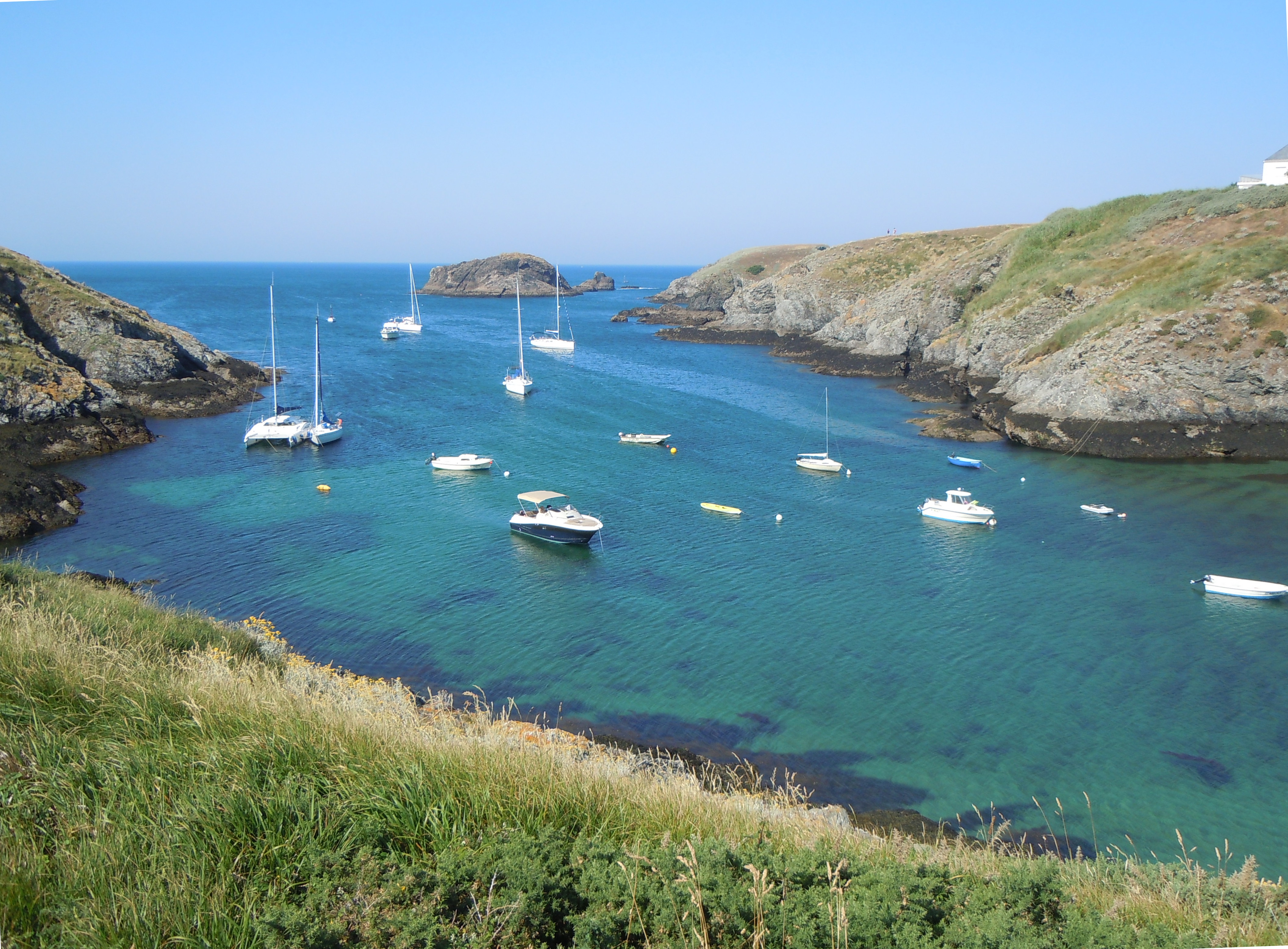 Port Goulphar, Bangor, Morbihan